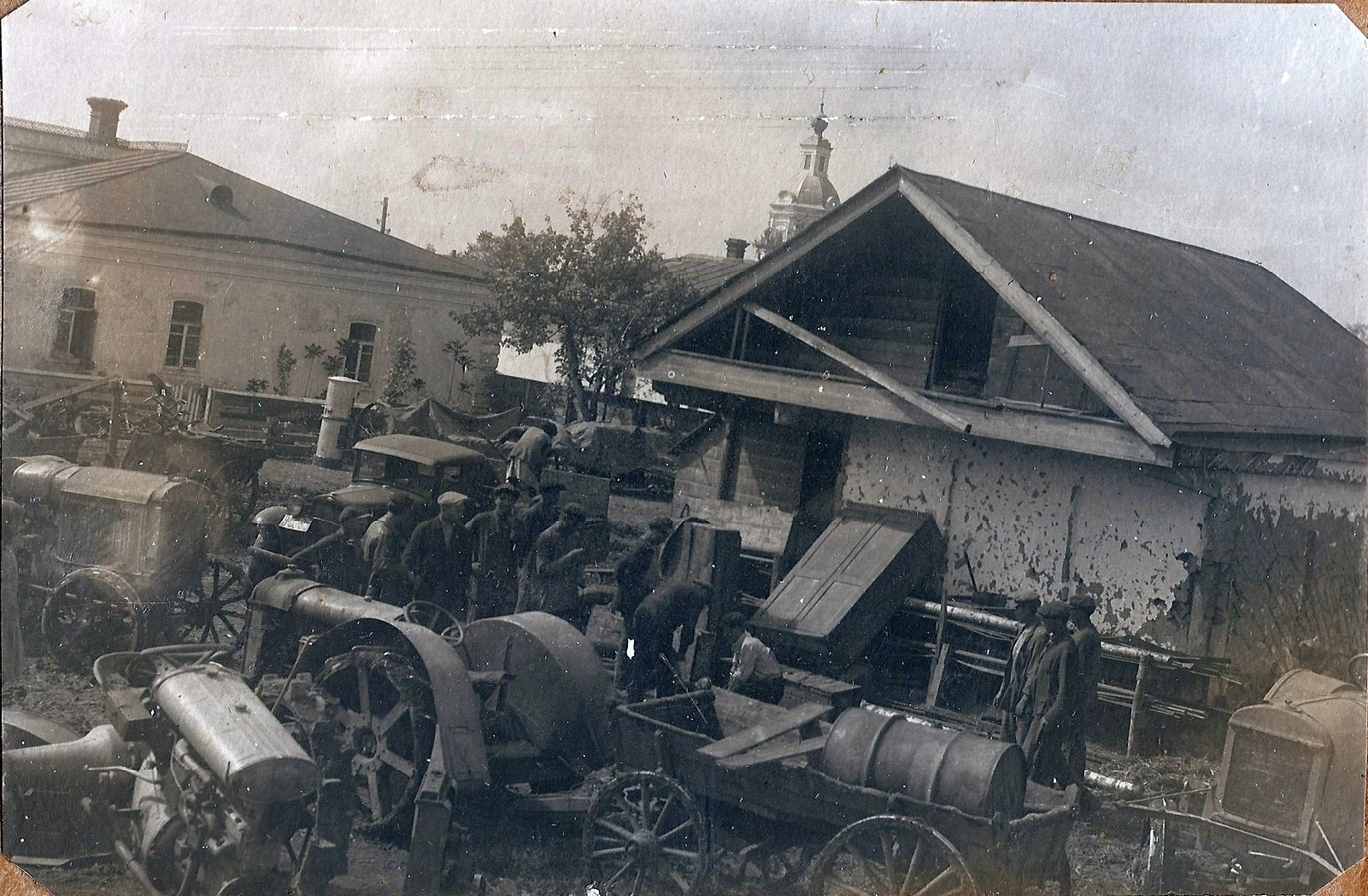 Ладожская 1932г, альбом Пемова. Виднеется купол старой церкви